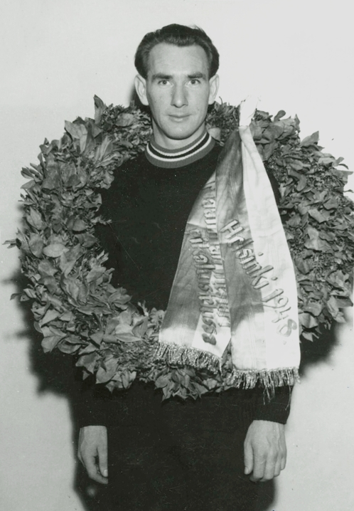 Odd Lundberg